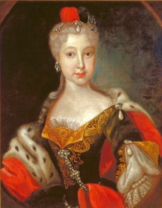 Sie war die jüngere Schwester von Elisabeth Auguste von Bayern. Maria heiratete im Jahre 1746 Friedrich Michael von Pfalz-Birkenfeld (1724–1767). Ihr Sohn Maximilian I. (1756–1825) wurde später König von Bayern. Allerdings erlebte sie den Aufstieg ihrer Familie nicht mehr. Die Beziehung zu ihrem Mann war seit 1760 gescheitert. Nach ihren eigenen Angaben wurde sie "durch das üble Beispiel des von ihr verachteten Hofes" verführt, eine Beziehung mit einem Mannheimer Schauspieler einzugehen. Als sie schwanger wurde, entfernte man sie vom Hof. In Straßburg gebar sie einen Sohn und wurde dann quasi in Klosterhaft gesteckt; zunächst bei Ursulinen in Metz und dann zu den Augustinerinnen zu Bonnevoye im Herzogtum Luxemburg. Nach dem Tod ihres Mannes 1767 durfte sie auf Schloss Sulzbach ziehen. Sie starb im Jahre 1794 und fand in der Pfarrkirche zu Sulzbach ihre letzte Ruhestätte. Ihr Herz wurde getrennt bestattet und befindet sich seit 1983 in der Gnadenkapelle von Altötting.